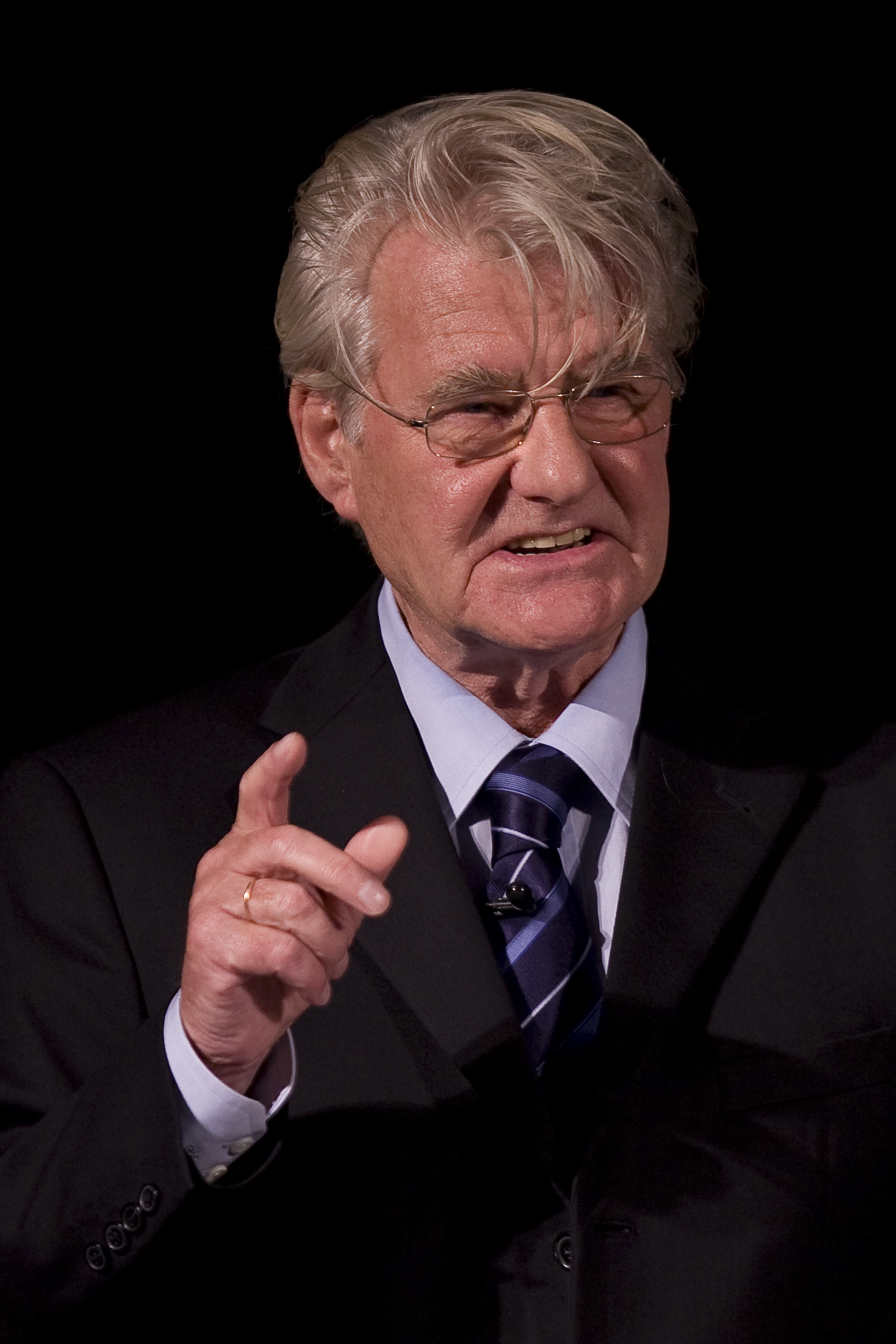 Professor Dr. Alexander Deichsel im Juni 2015 bei einer Vorlesung an der Universität Hamburg